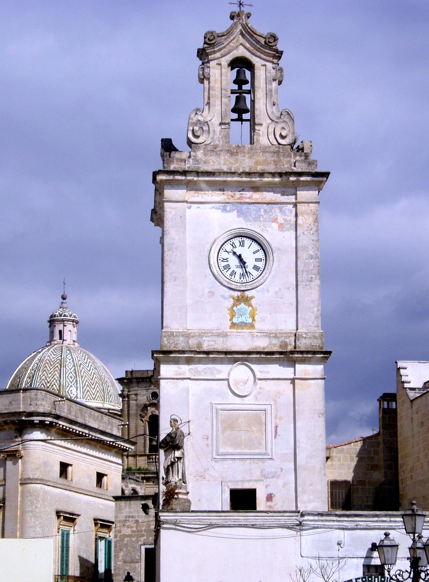 Francavilla Fontana (Brindisi): yorre dell'orologio in piazza Umberto I